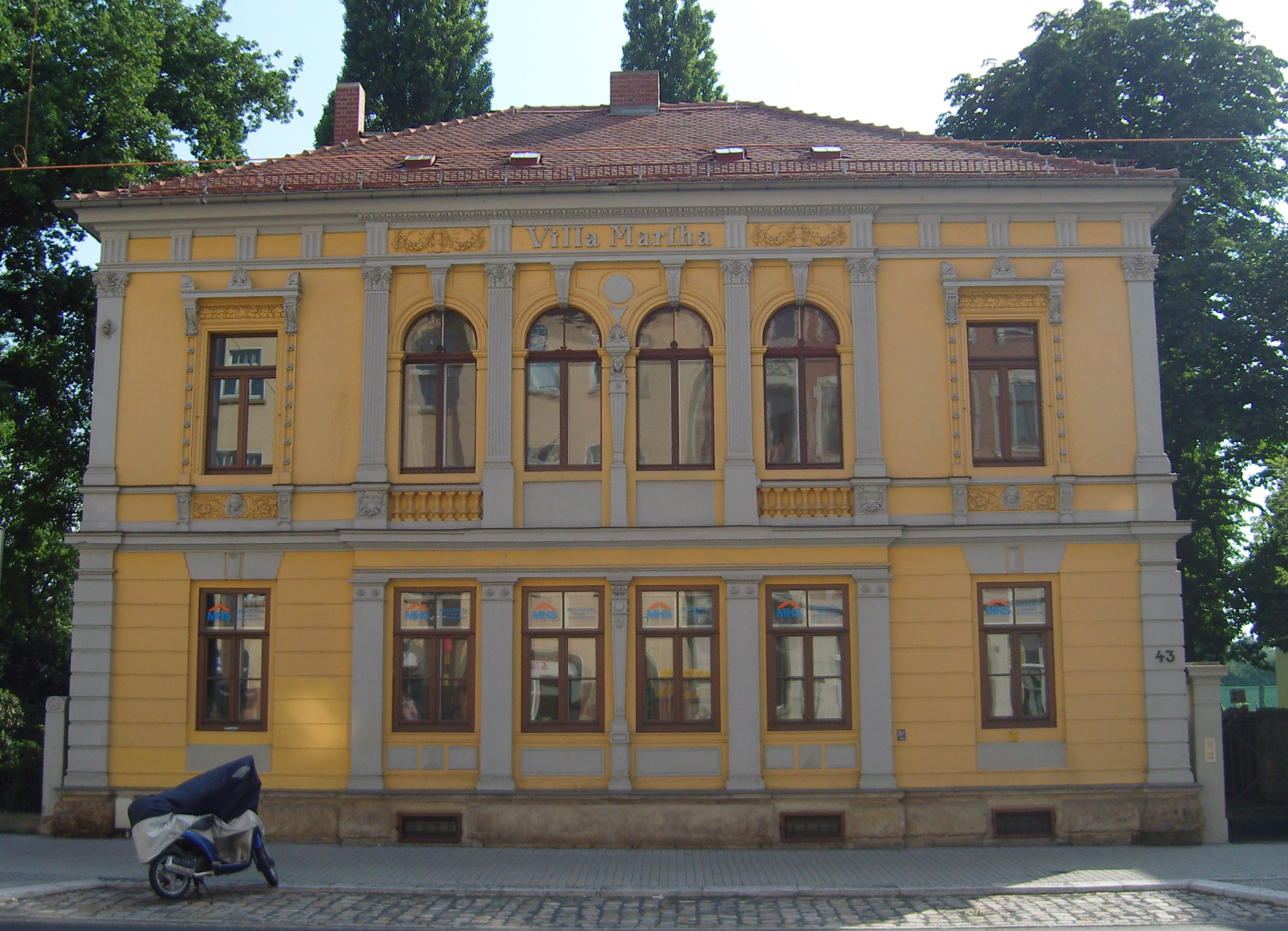 Villa Martha in der Leipziger Straße in Dresden, errichtet von den Gebr. Ziller